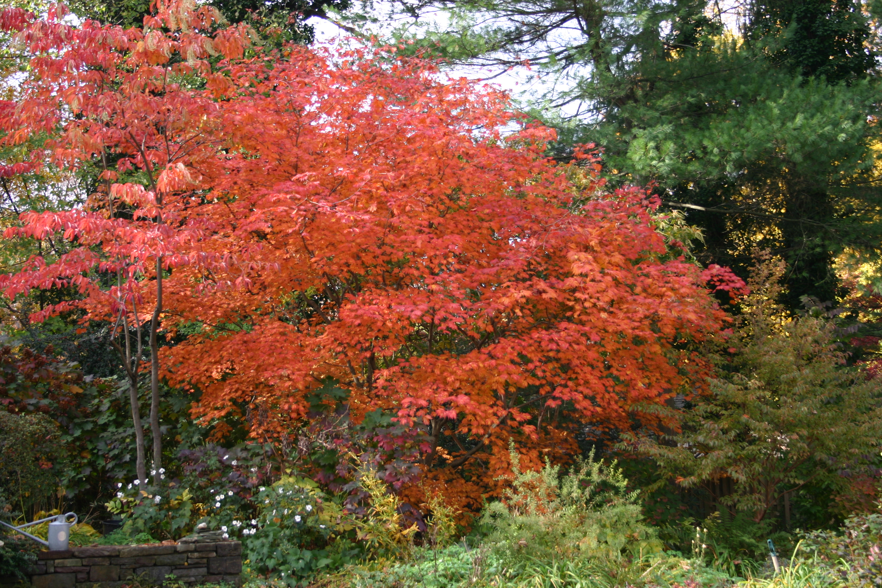 Moonleaf maple fall color Acer japonicum aconitifolium